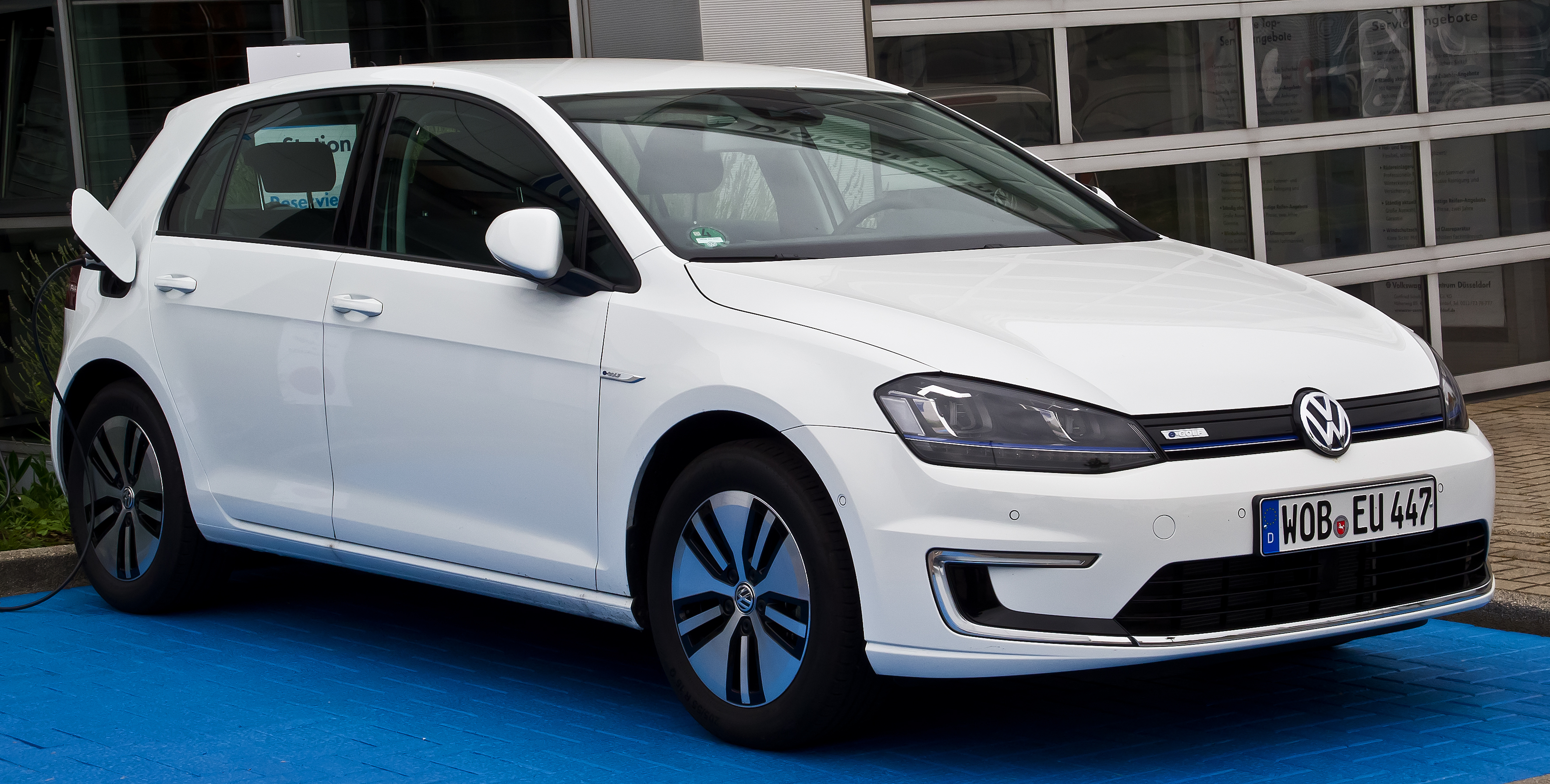 VW e-Golf (VII)